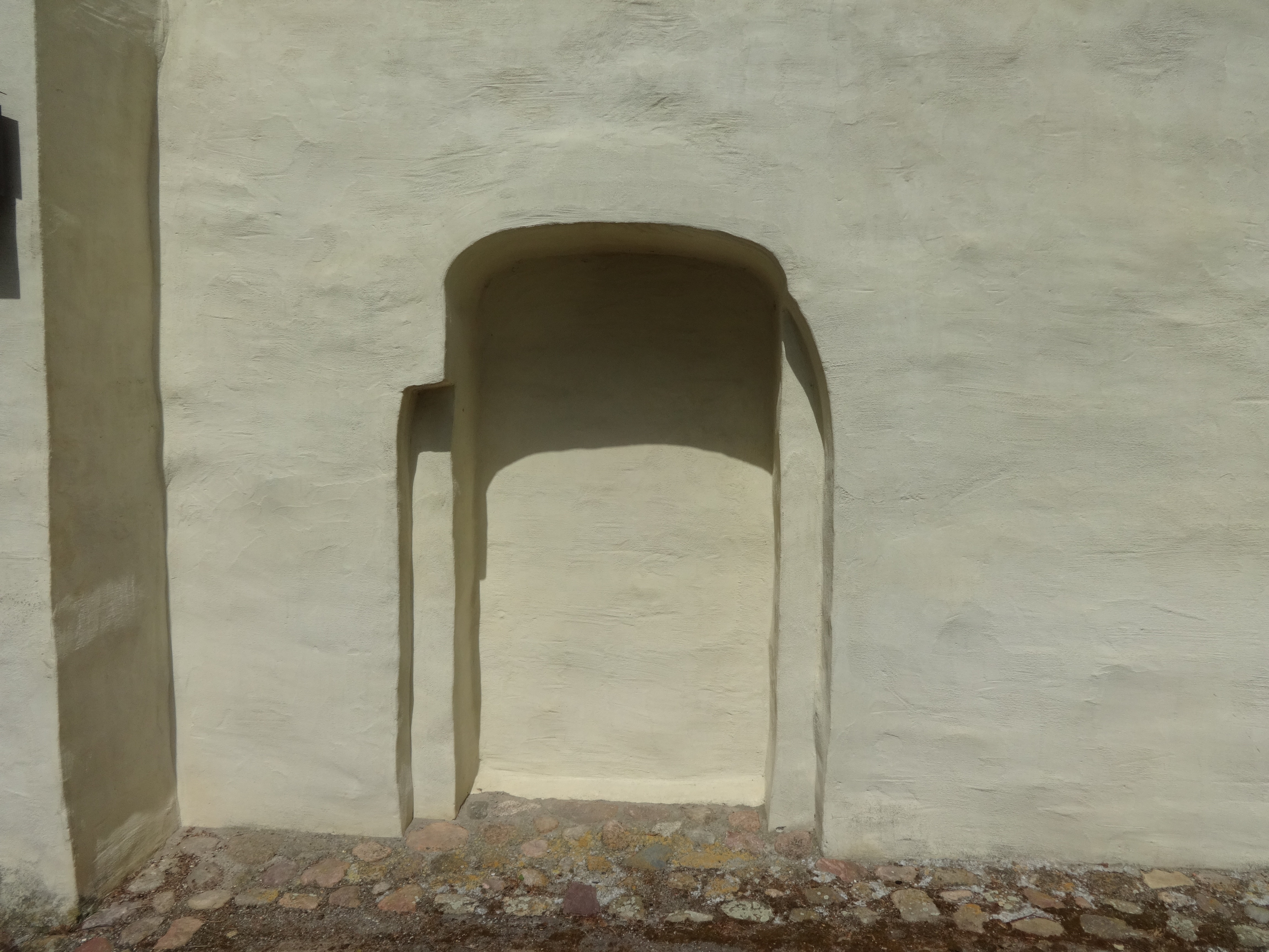 Die Saalkirche in Libbenichen entstand im Jahr 1736 auf den Resten eines mittelalterlichen Vorgängerbaus. Bei Instandsetzungsarbeiten nach dem Zweiten Weltkrieg legten Handwerker die Reste eine mittelalterlichen Ausmalung frei. Der Kanzelkorb stammt aus der ersten Hälfte des 19. Jahrhunderts.